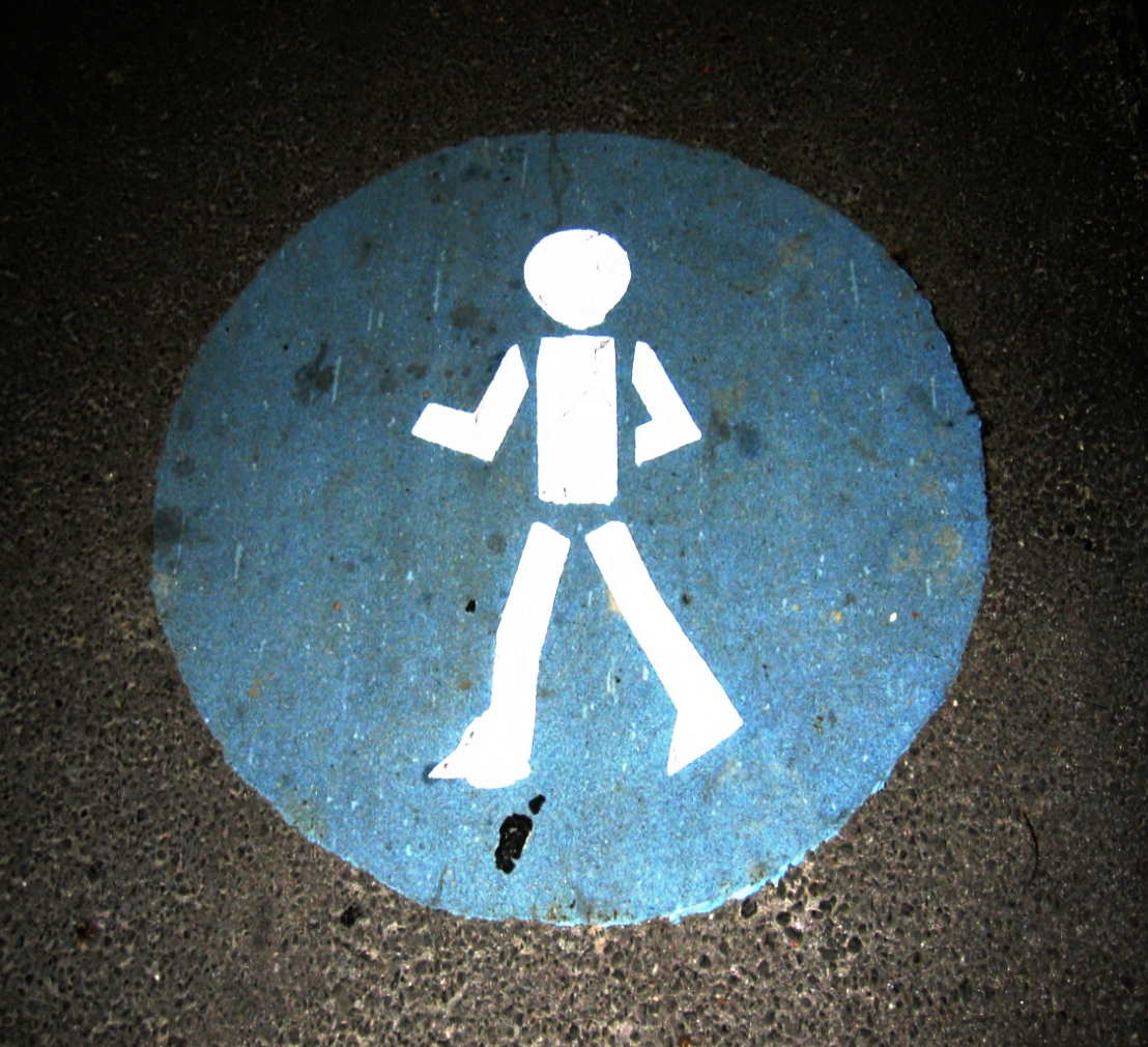 Pedestrian-area sign painted on the ground. Photo was taken by night. Apparently the paint had some fluorescent indigrients. Fußgängerweg-Zeichen auf Asphalt, bei Nacht fotografiert. Hatte vermutlich eine fluoreszierende Beschichtung. Aufnahmeort ist nicht mehr bekannt.